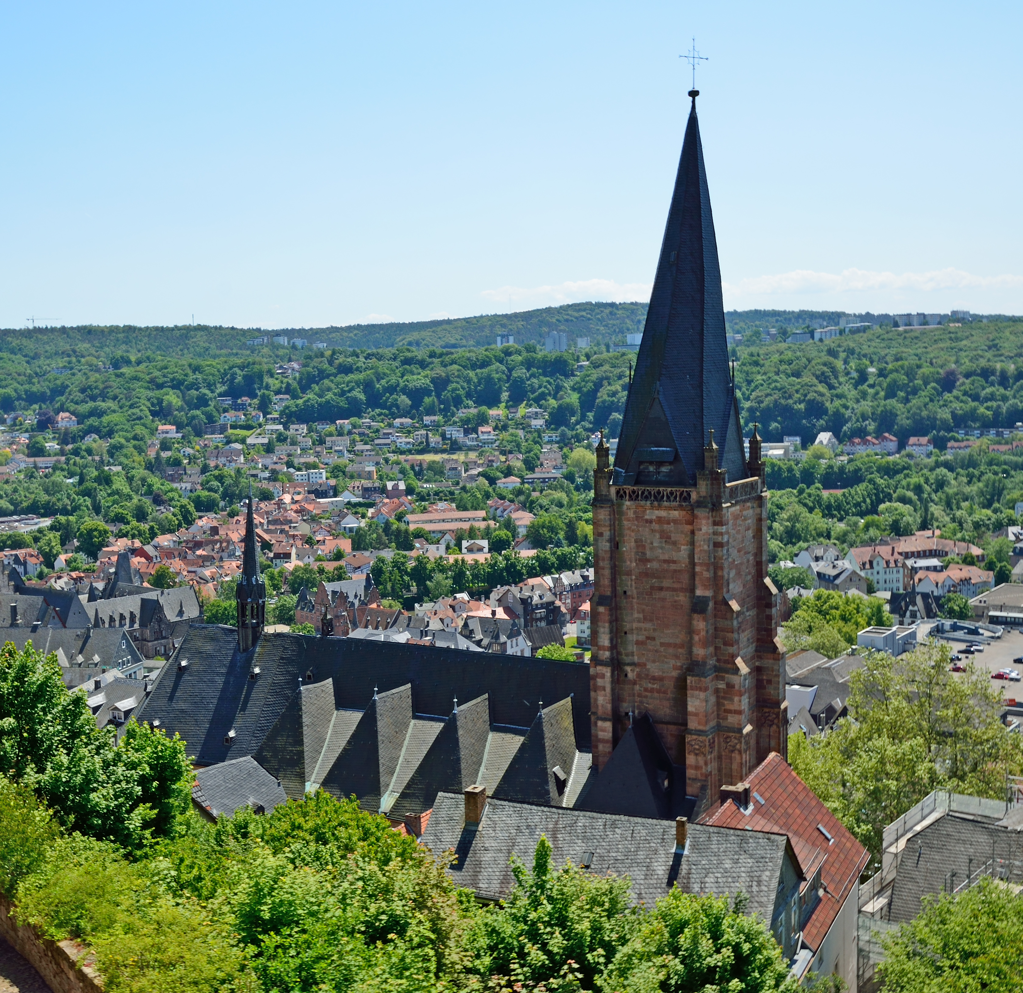 Die Lutherische Pfarrkirche vom Marburger Schloss